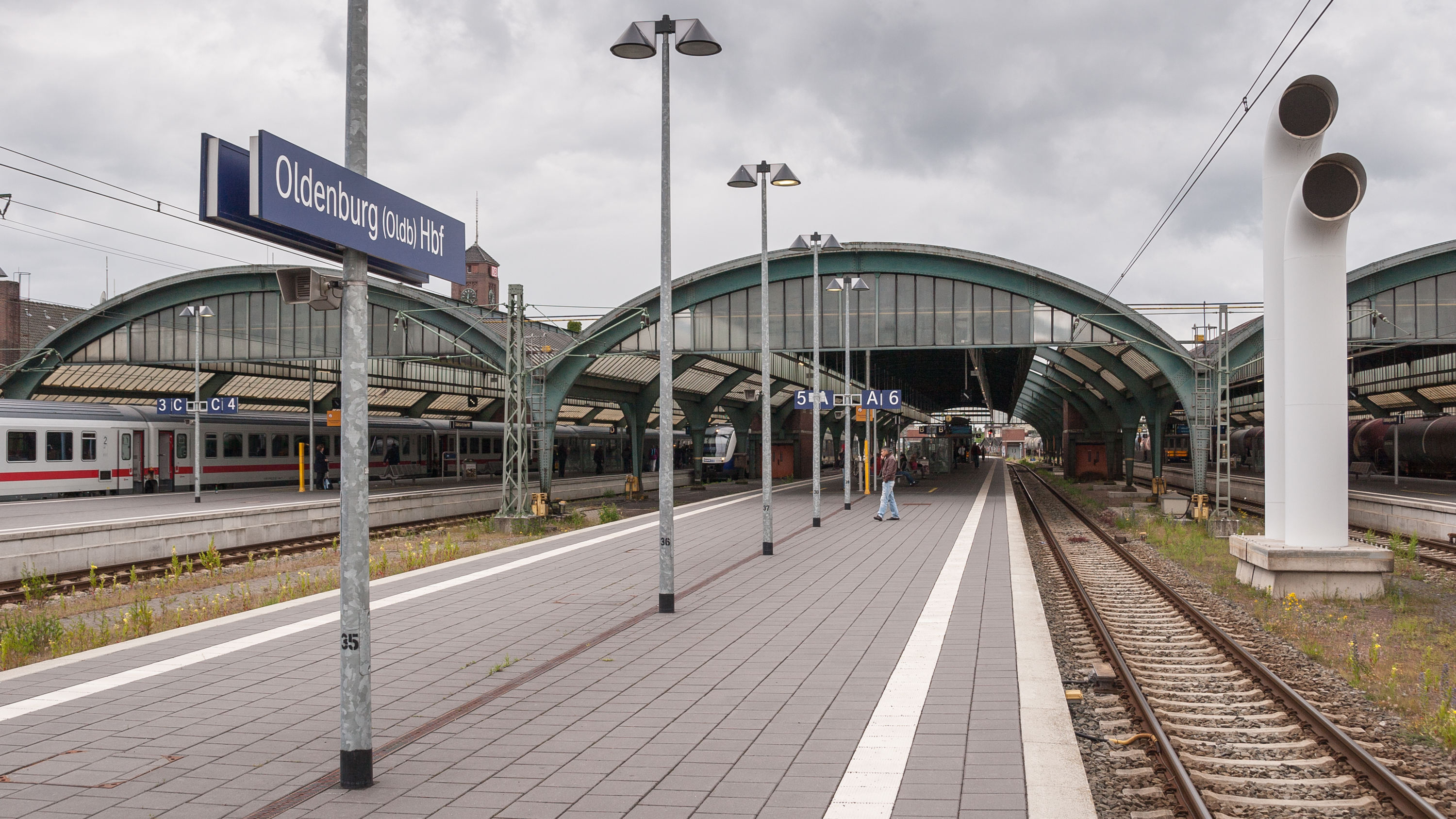 Bahnsteig(halle) des Oldenburger Hauptbahnhofs (2009)